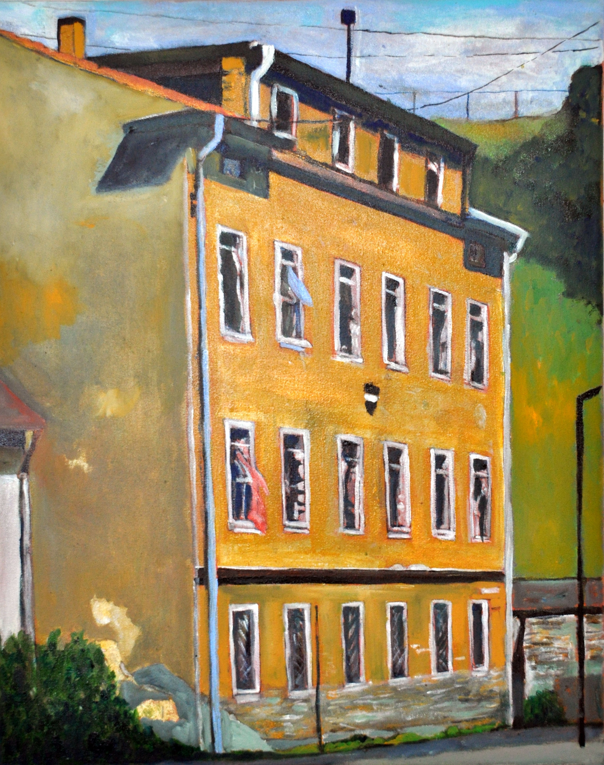 Gemälde mit Ansicht des Gebäudes "Großes Müllroser Straße 78" in Frankfurt (Oder). Das Bild zeigt den Bauzustand um 2000. Das Gebäude wurde 2010 abgerissen.